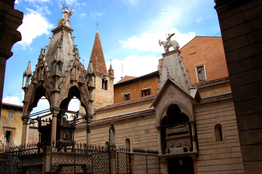 Panorama delle Arche Scaligere